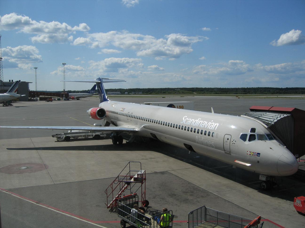 SAS MD-80 -Svdmolen